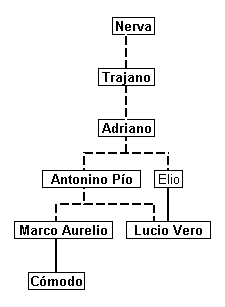 Árbol genealógico simplificado de los emperadores antoninos, con adopciones